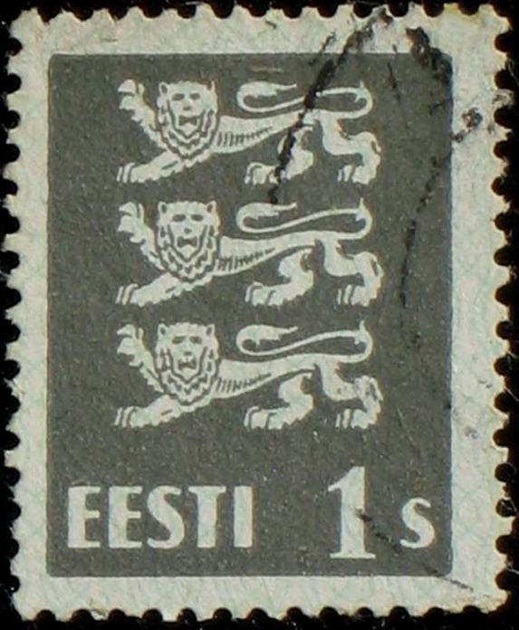 Почтовая марка Эстонской ССР в составе СССР.